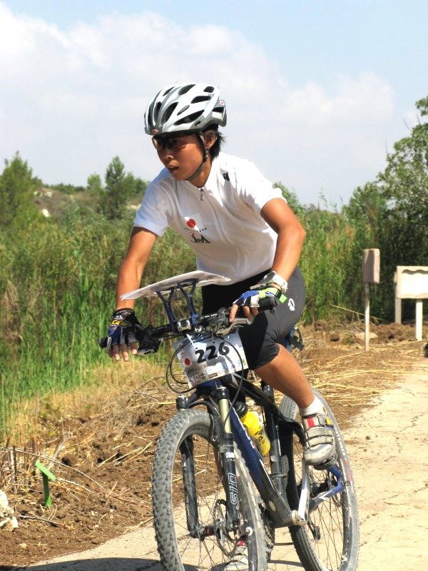 宮内選手のMTBO写真